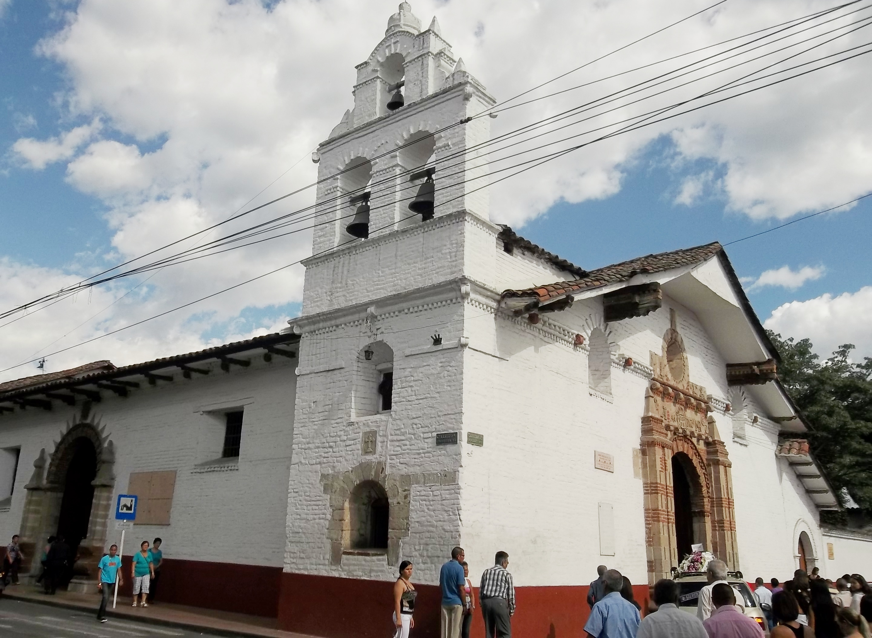 Sector Antiguo de la ciudad de Buga, Valle del Cauca, Colombia